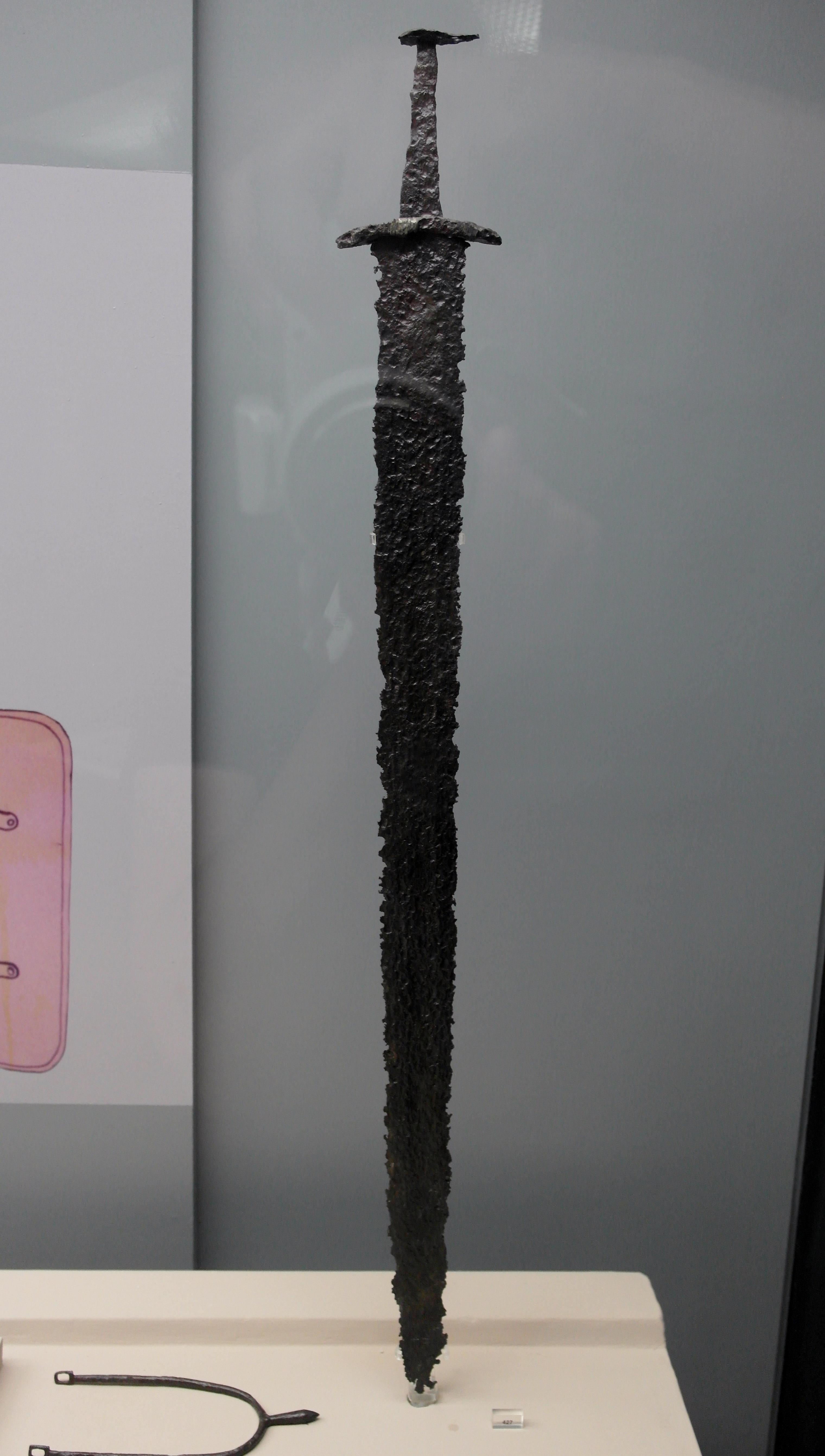 Espada sueva do museo de Conimbriga, Condeixa, Portugal